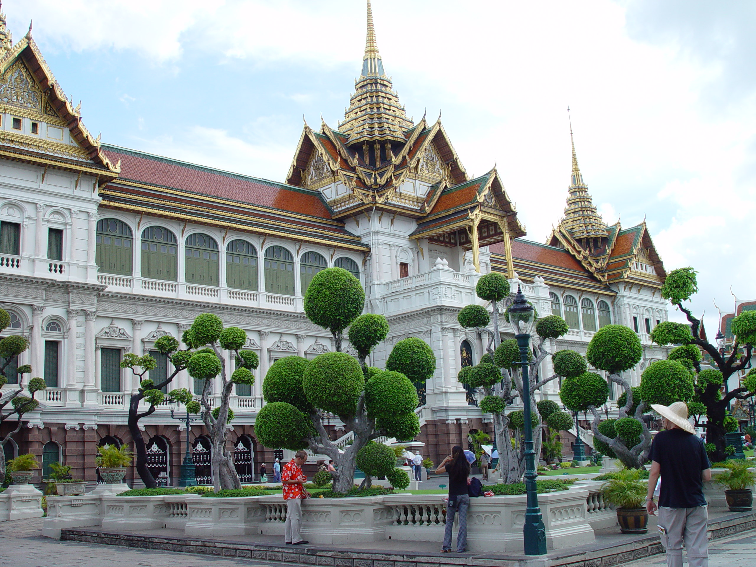 Chakri Mahaprasad Hall (Grand Palace, Bangkok, Thailand)